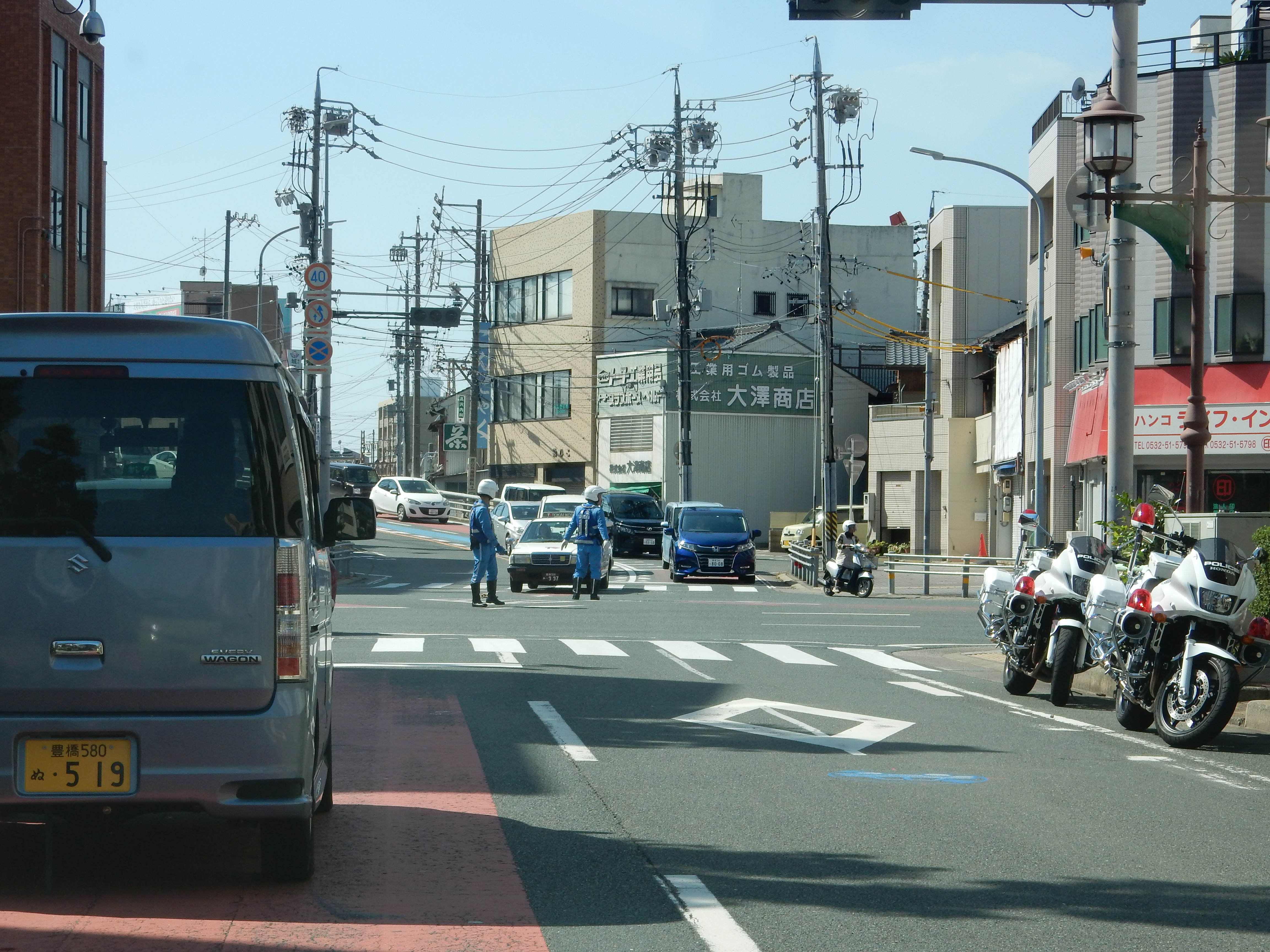 平成30年台風24号